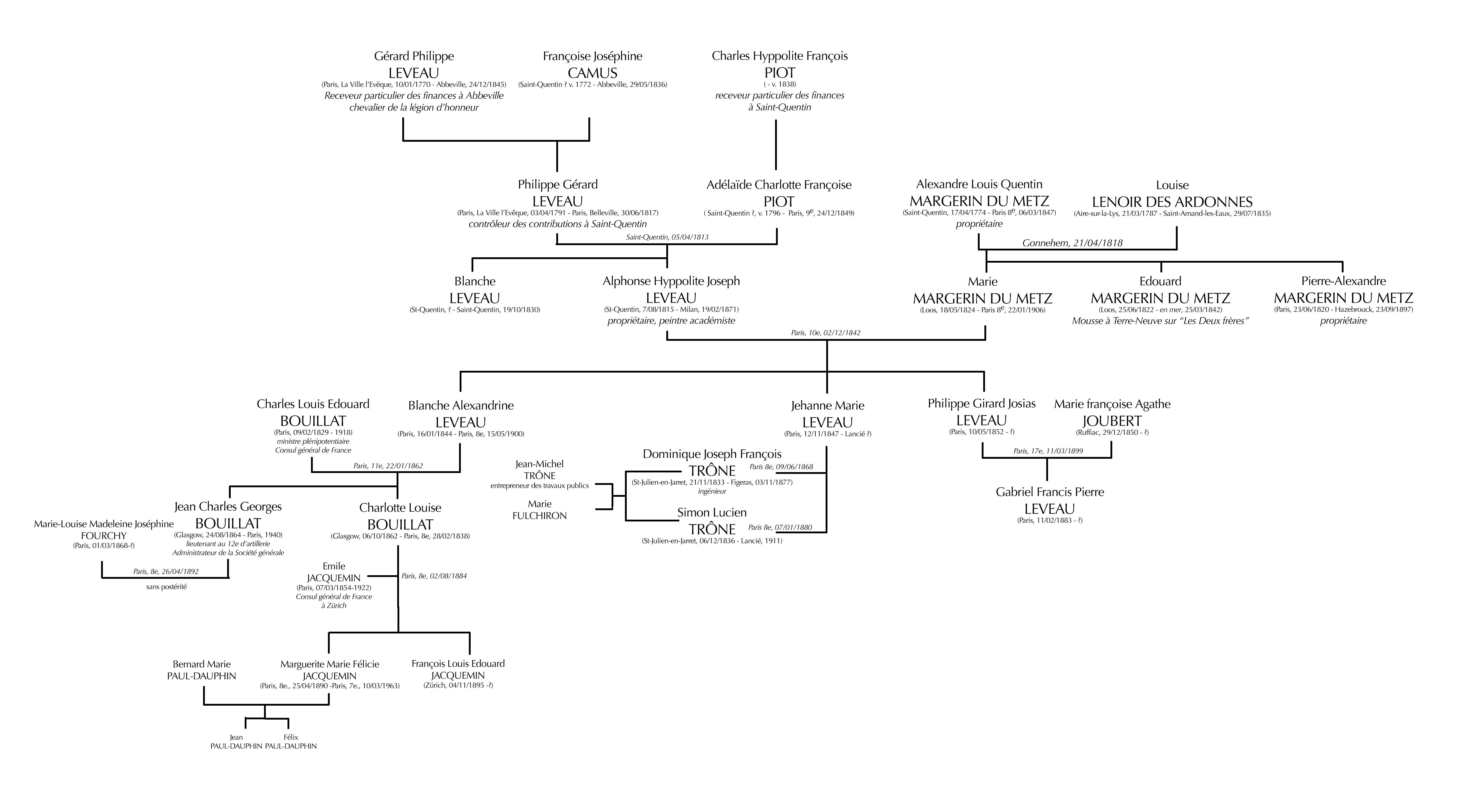 Arbre généalogique de la Famille du peintre Alphonse Hippolyte Leveau